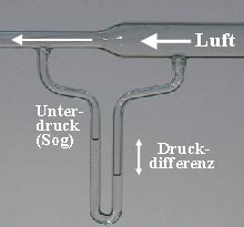 Venturirohr; Sogwirkung für Messung der Geschwindigkeit von Fluiden